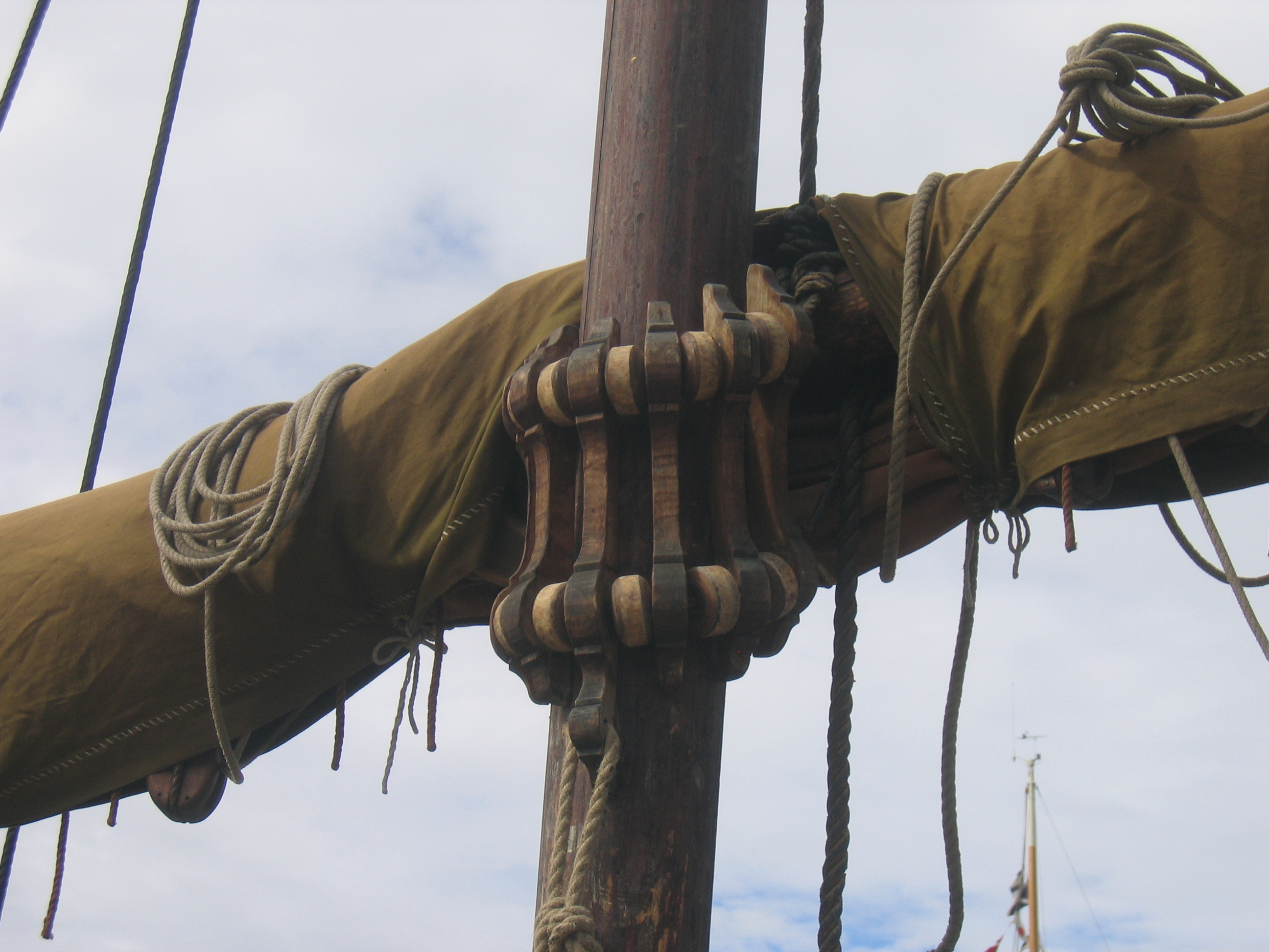 Kulerakke på gamal bruksbåt